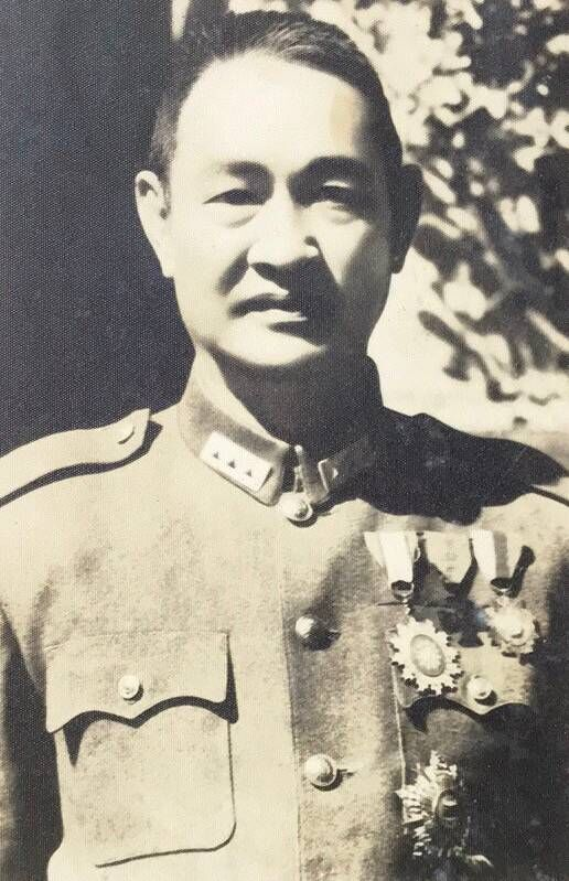 程潜